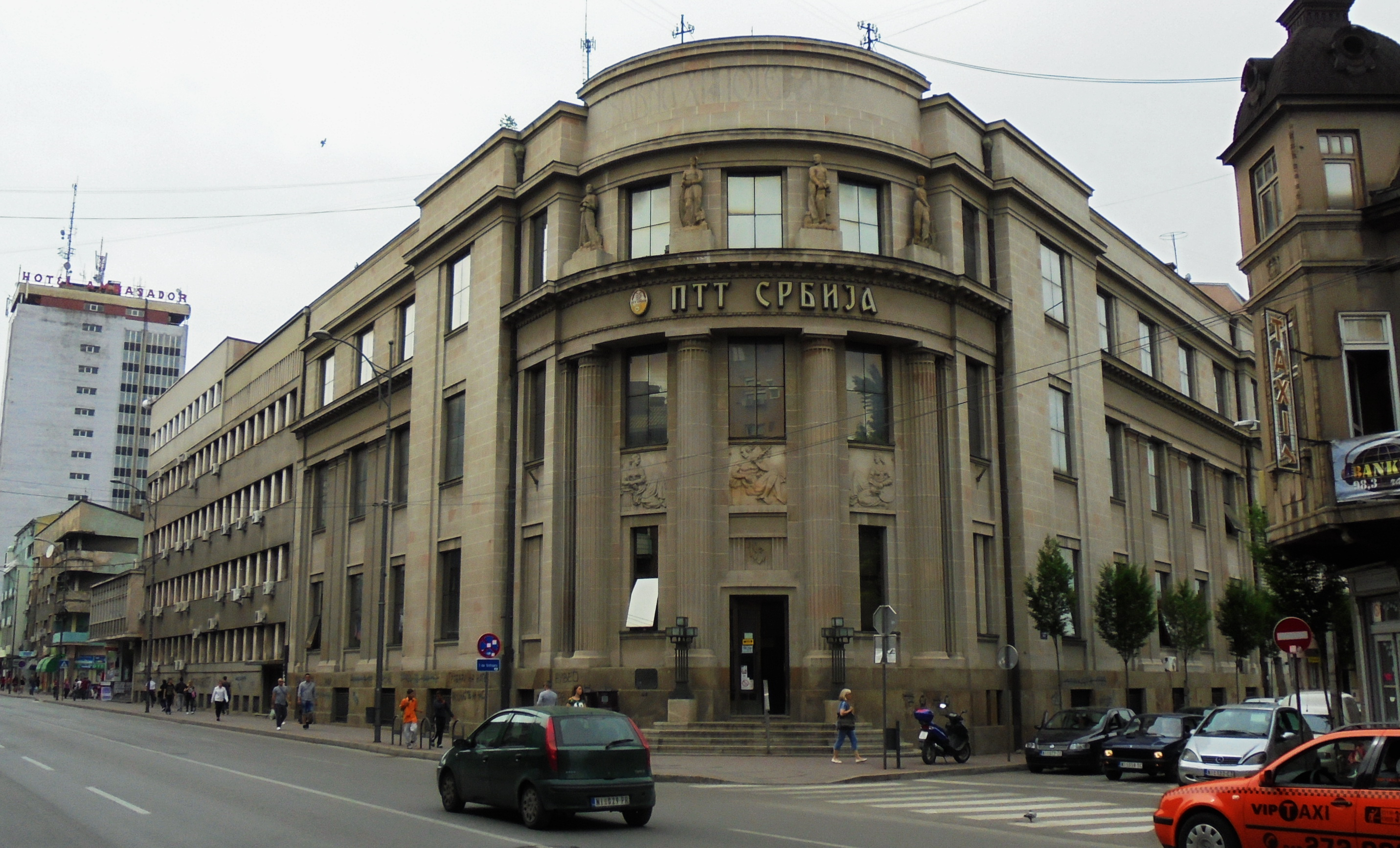 Srpski (latinica): Zgrada Glavne pošte u Nišu, spomenik kulture (SK 1917). Nekadašnja Državna hipotekarna banka.